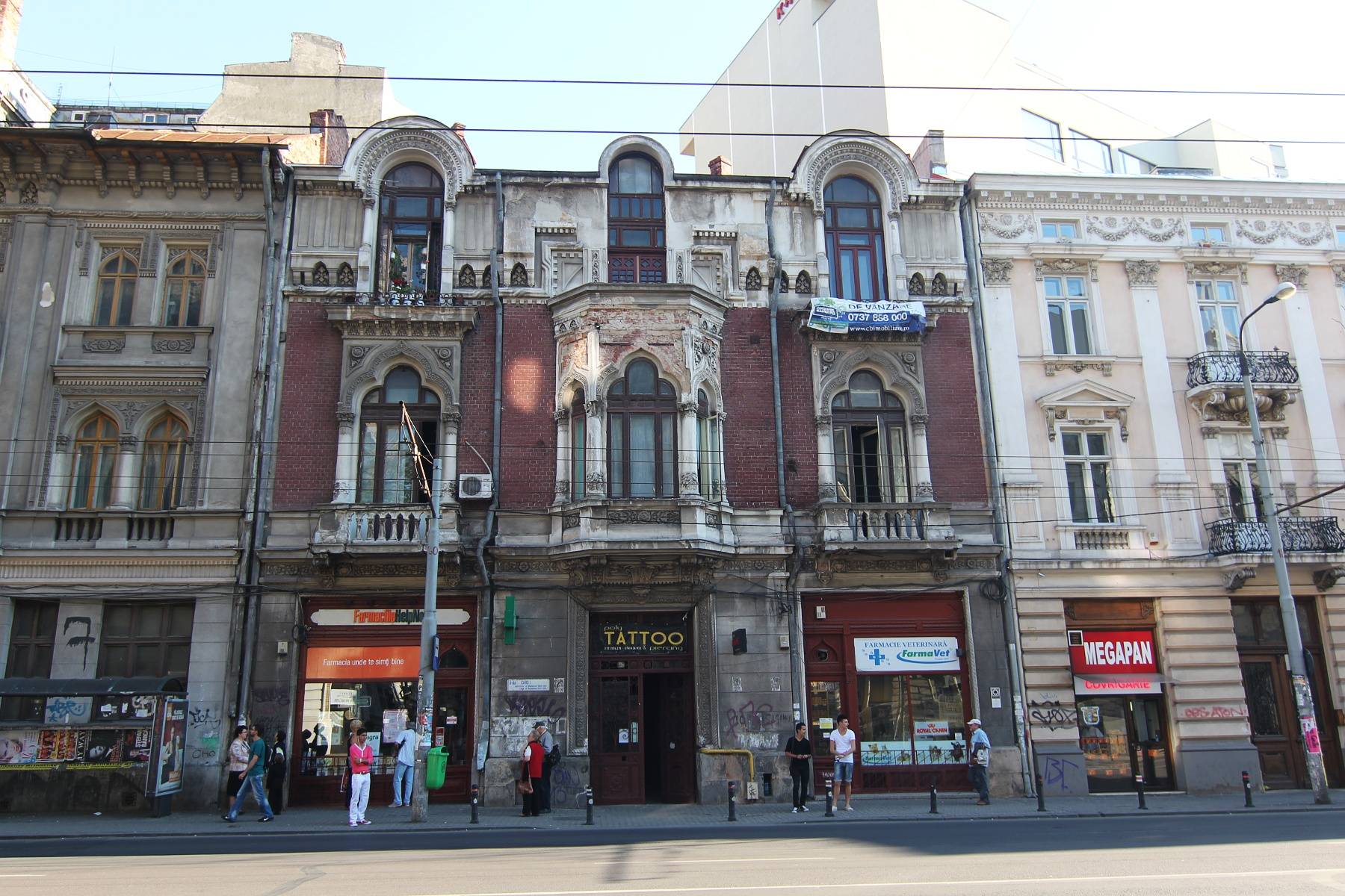 Casă pe Bulevardul Carol